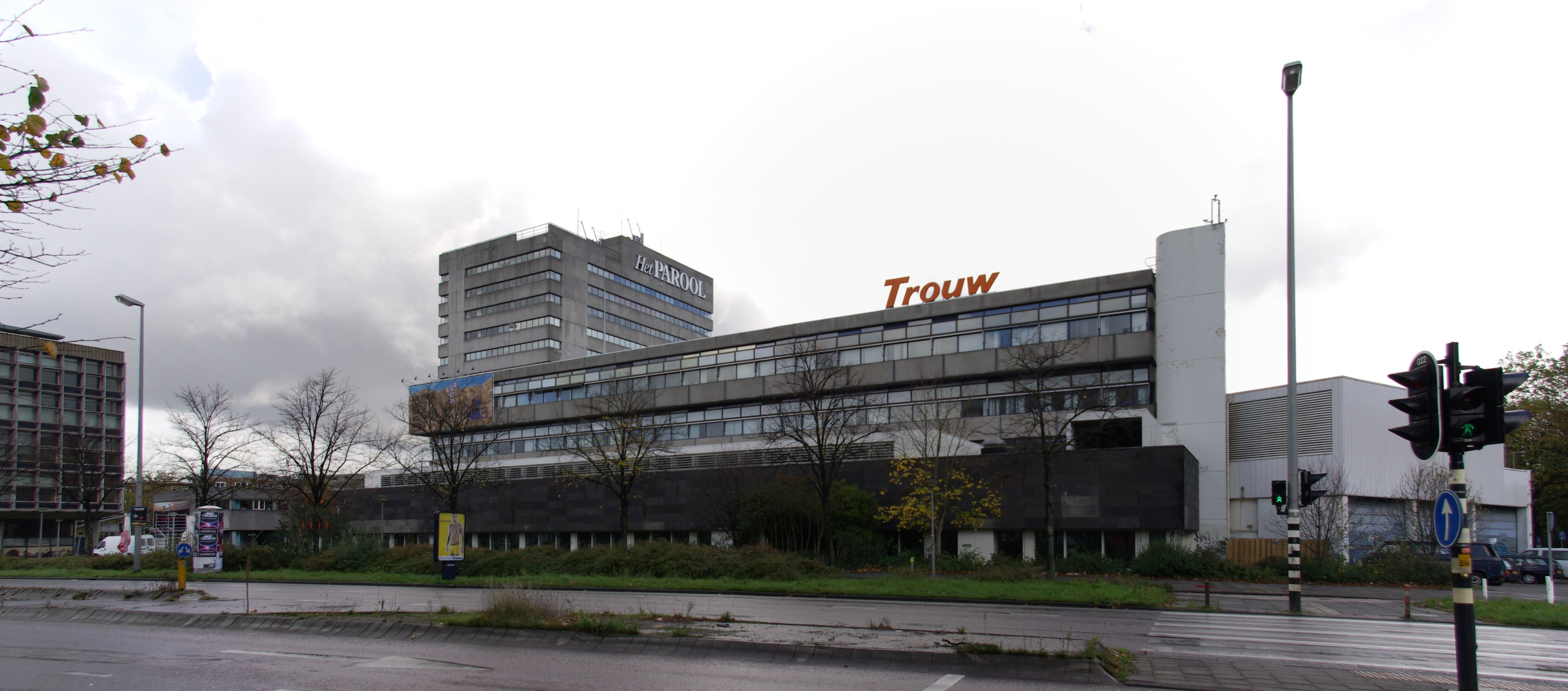 Ehemalige Verlagsgebäude der Zeitungen Het Parool und Trouw in Amsterdam